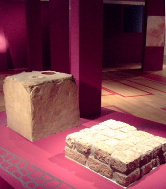 Ausstattungsgegenstände der Cella memoriae aus dem Bereich des Bonner Münsters Ausstellungsort: Rheinisches Landesmuseum Bonn Aufnahme: 20.12. 2006 Url